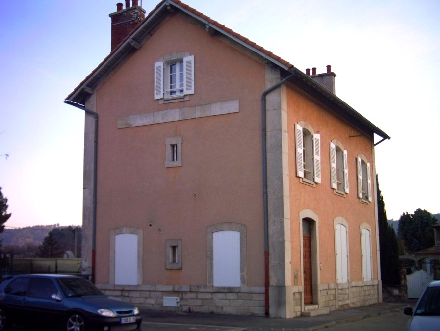 L'ancienne gare de Cadolive, aujourd'hui propriété privée (vue côté rue).